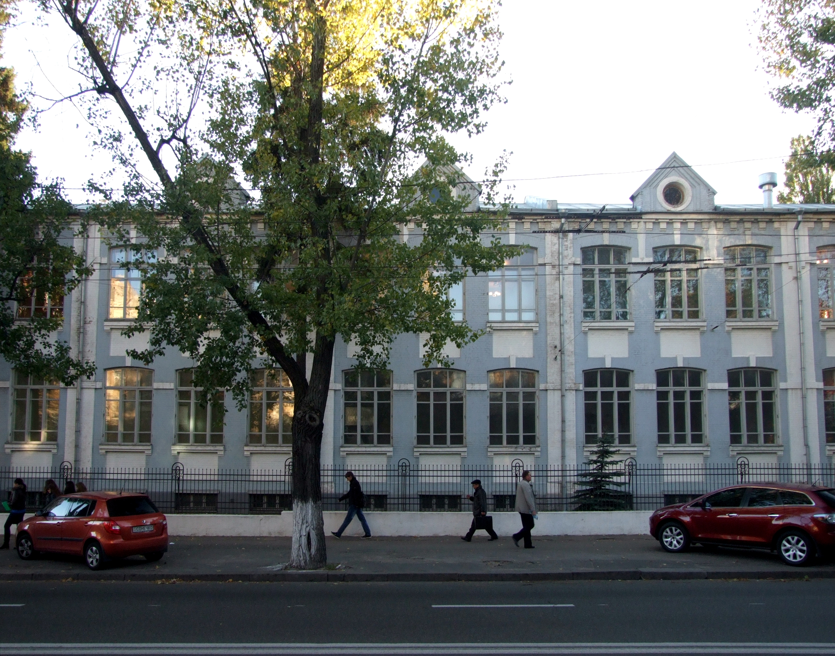 6-а чоловіча гімназія, арх. О. Кобелєв, П. Жуков, 1912–1913 рр.